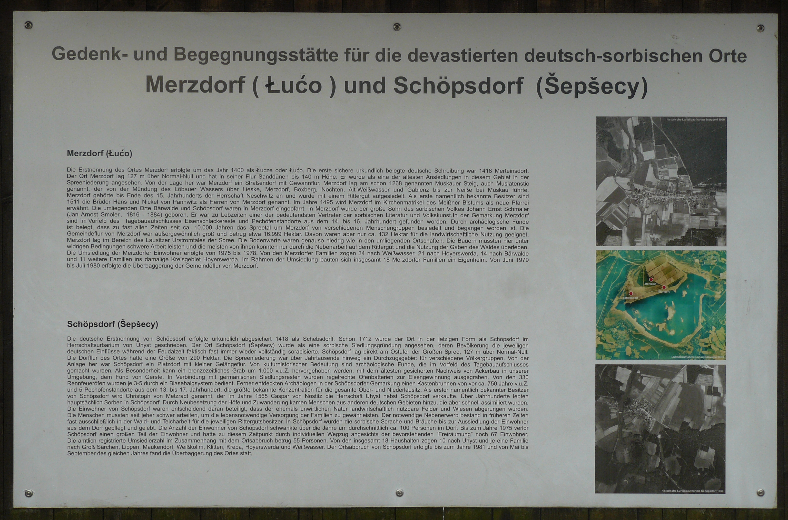 Informationstafel an der Gedenkstätte für die abgebaggerten Dörfer Merzdorf und Schöpsdorf am Bärwalder See